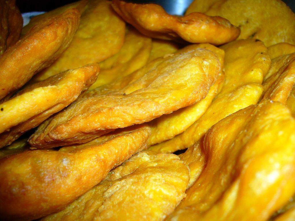 Sopaipillas